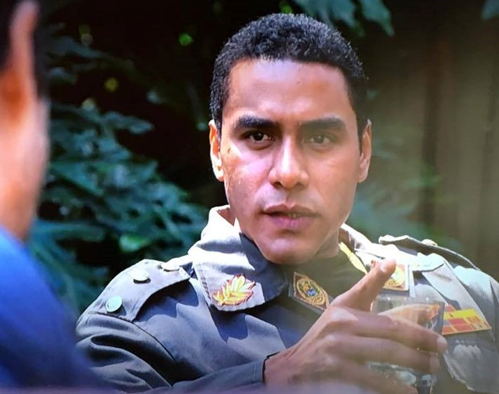 Jesús Delgado como el General Bernal Vivas en "El Chema" de Telemundo, 2016